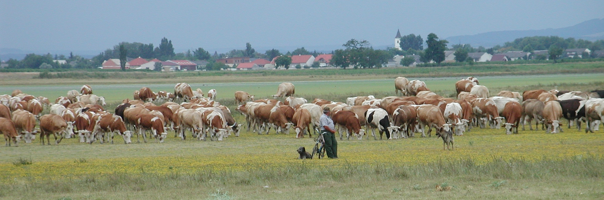 Kühe auf der Hutweide vor Apetlon